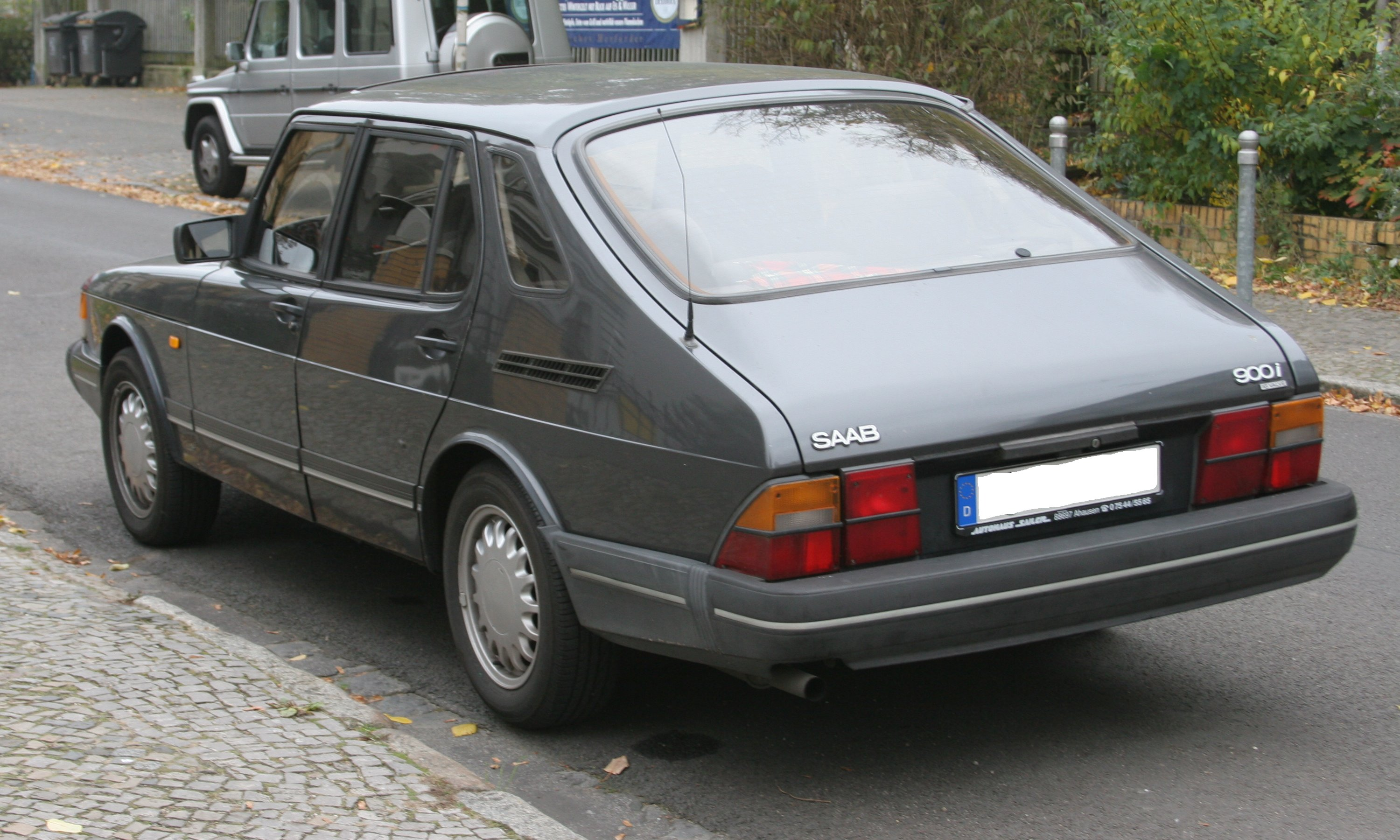 Saab 900i 16v